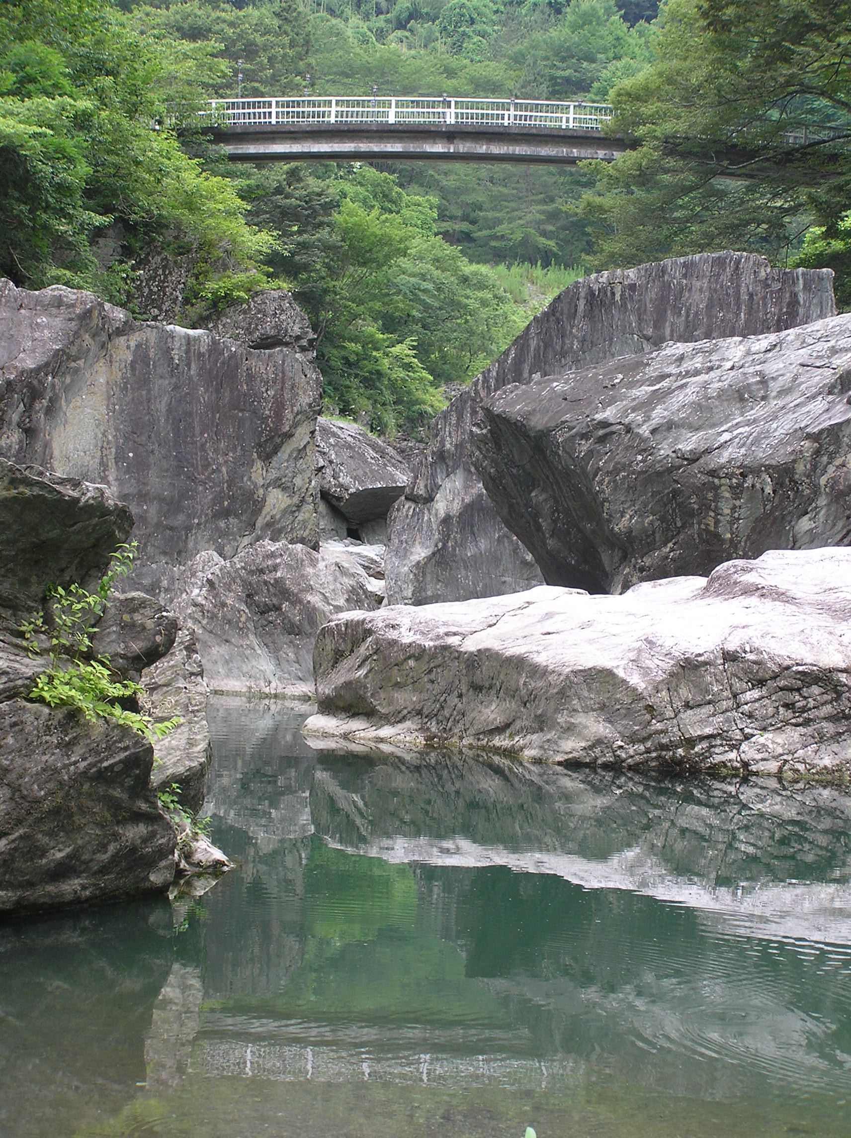 夏の三波石峡